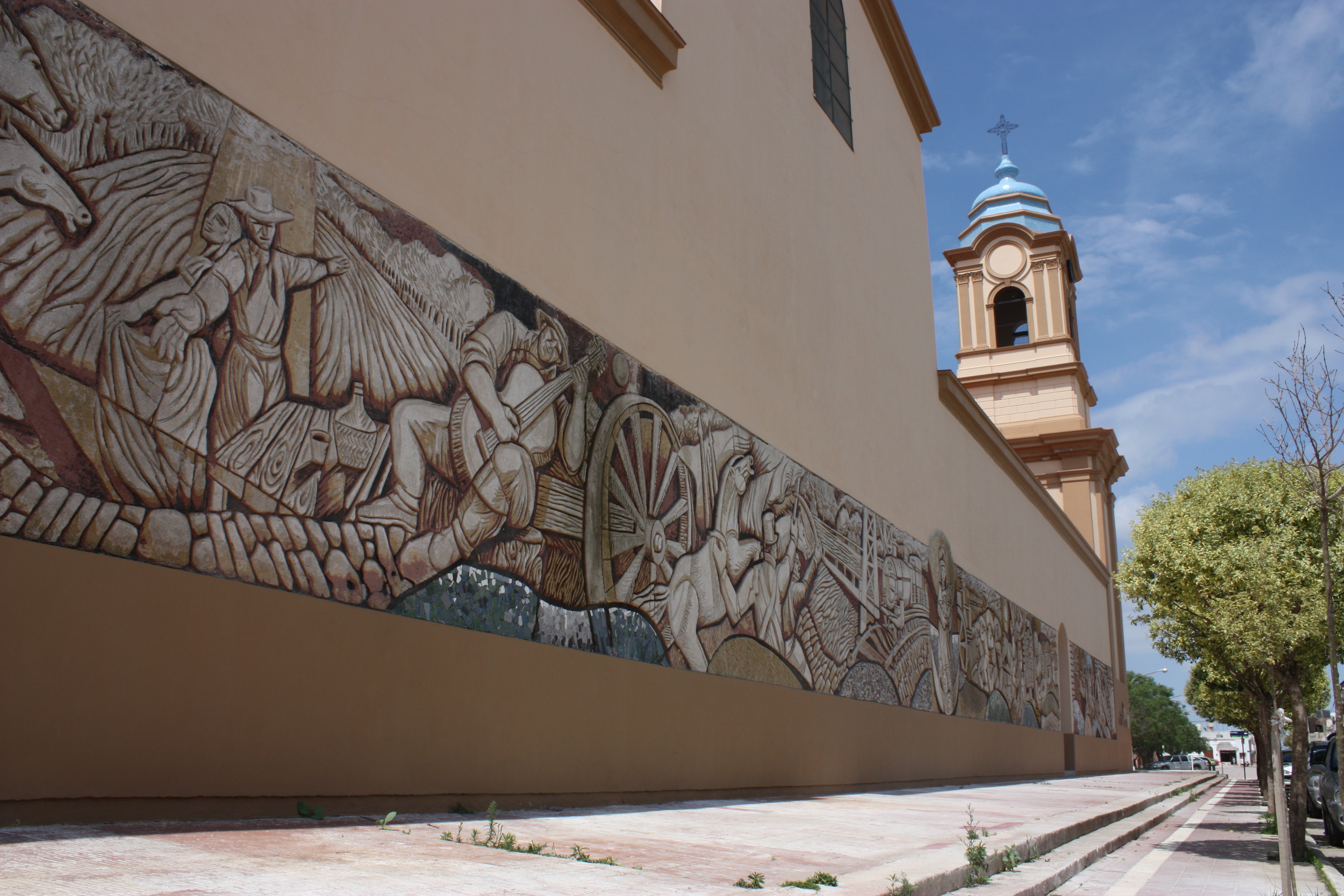 Mural "Epopeya de la Villa" ubicado en la pared sur de la Basìlica de Nuestra Senyora del Rosario en la ciudad argentina de Villa del Rosario. Realizado con estilo Esgrafiado por artistas locales bajo dirección de Jose Kura